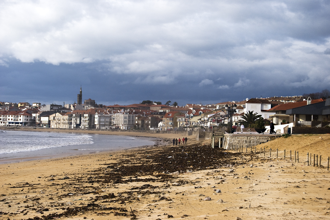 Panxón, Nigrán. Galiza